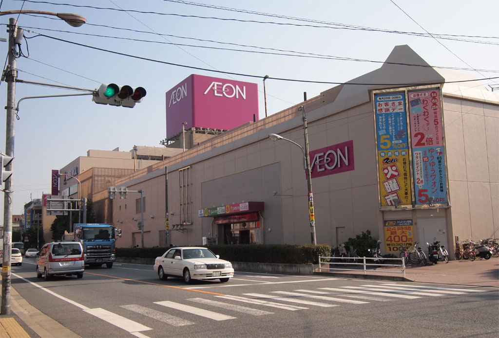 イオン大野城ショッピングセンター県道112号線北側外観